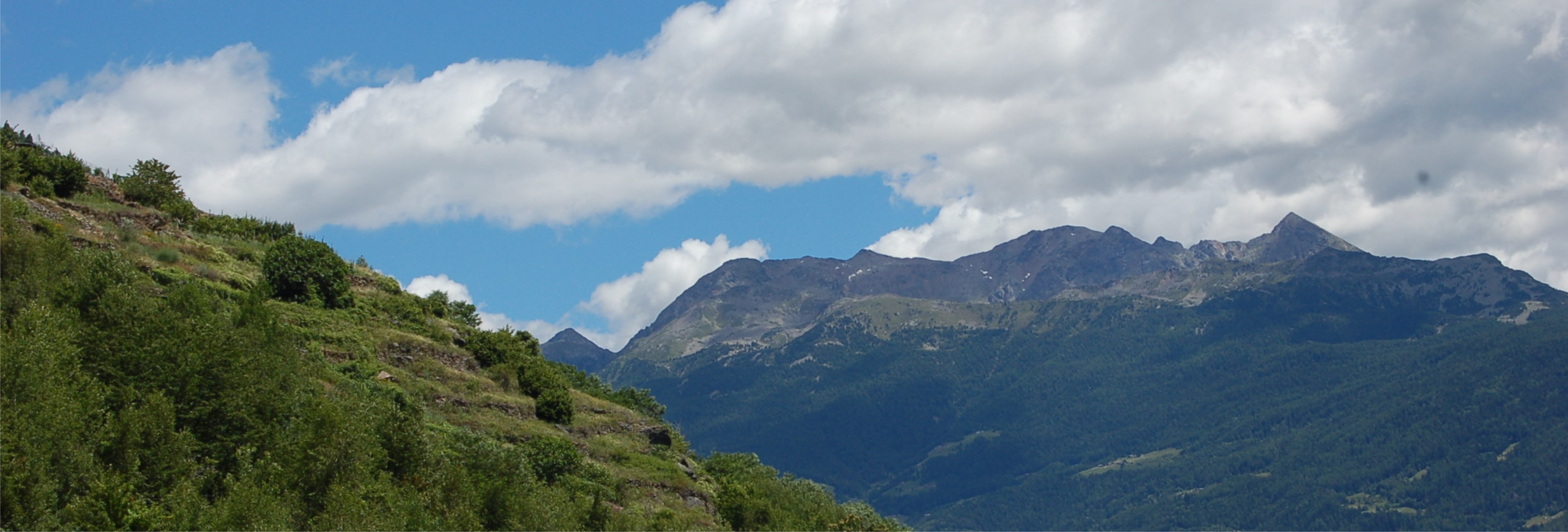 Baruffini- Tirano (SO) veduta del Gruppo del Mortirolo